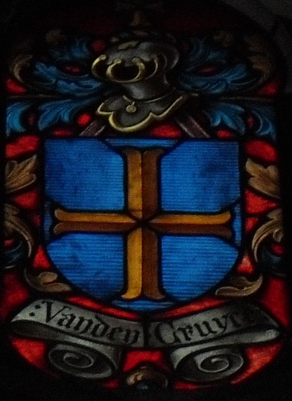 Wapenschild familie Van den Cruyce (glasraam OLV Kathedraal Antwerpen)